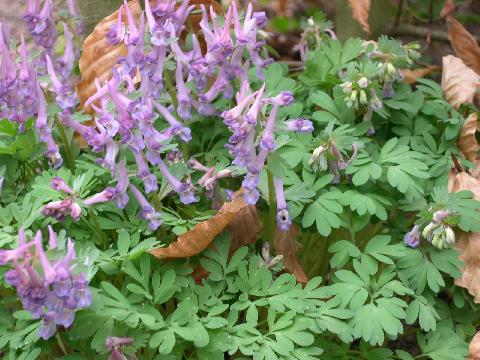 Corydalis solida, eigen afbeelding